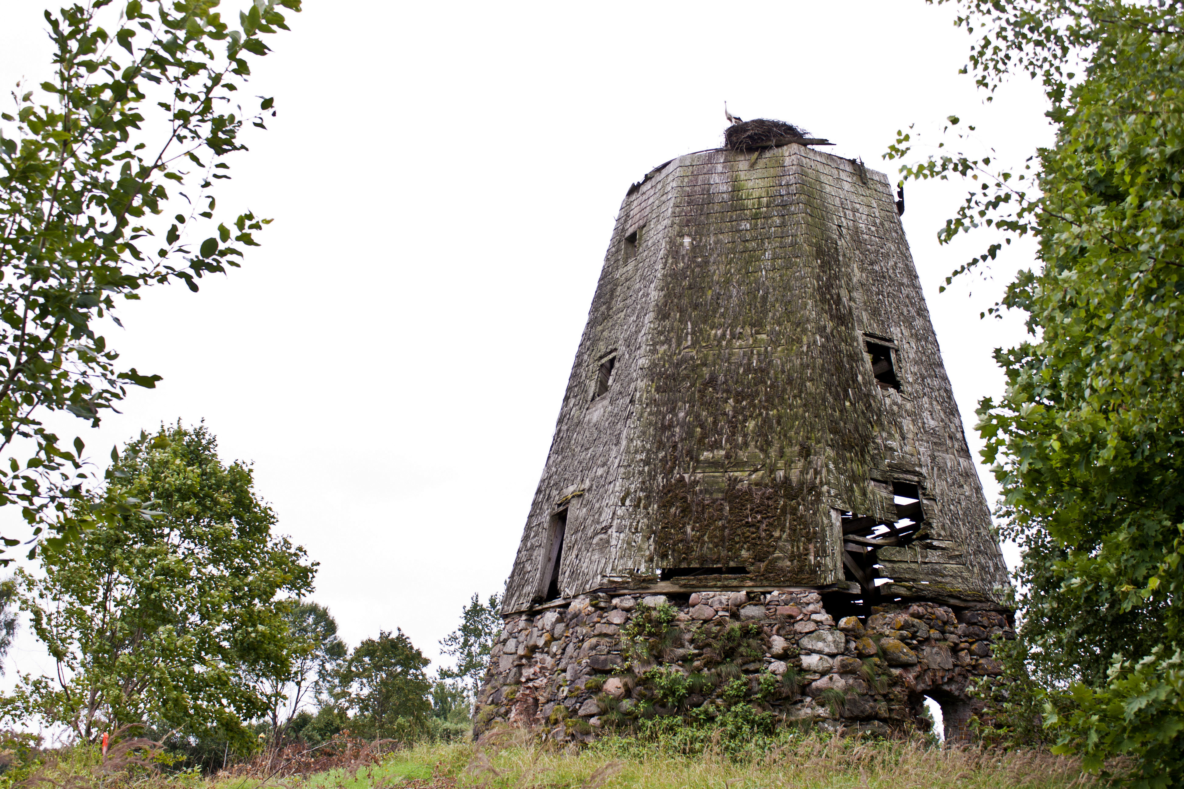 Kapukroga vējdzirnavas / windmill